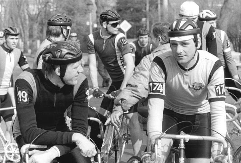 Radrennen, Gus-Erik Schur, Wolfgang Lötzsch ADN-ZB/Oberst 3.4.88 Berlin: Straßenrennen Berlin-Leipzig Ein Klassiker im Straßenradsport der DDR ist das Rennen Berlin-Leipzig. Zu den ca. 150 Fahrern, die in Berlin-Bohnsdorf zum 46. Mal an den Start zu dieser 200-km-Distanz gingen, gehörten Gus-Erik Schur (l) vom SC DHfK Leipzig und Wolfgang Lötzsch (r) von der BSG Moto Ascota Karl-Marx-Stadt. Abgebildete Personen: Lötzsch, Wolfgang: Radsportler, DDR Schur, Gus-Erik: Radsportler, Sohn von Gustav-Adolf (Täve) Schur, DDR#